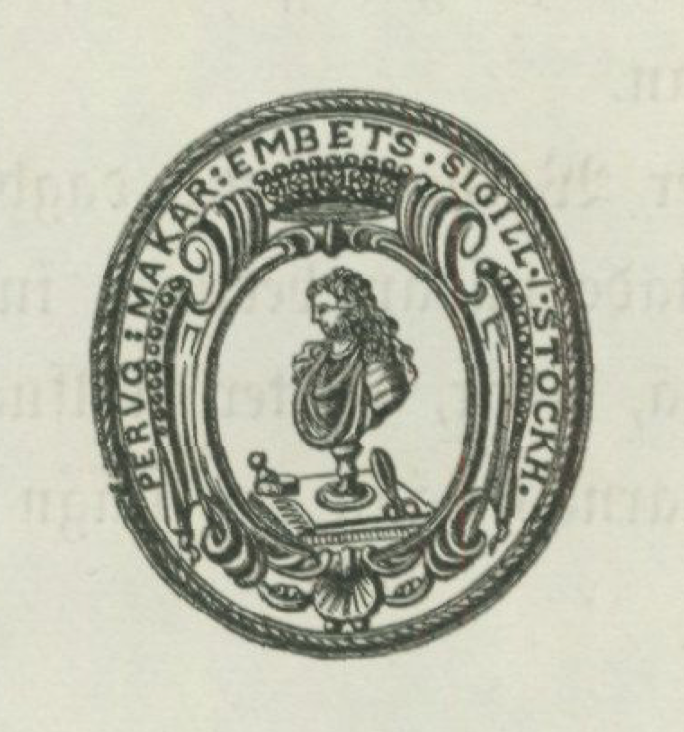 Perukmakarämbetets sigill (1720) avbildat i Fataburen 1898